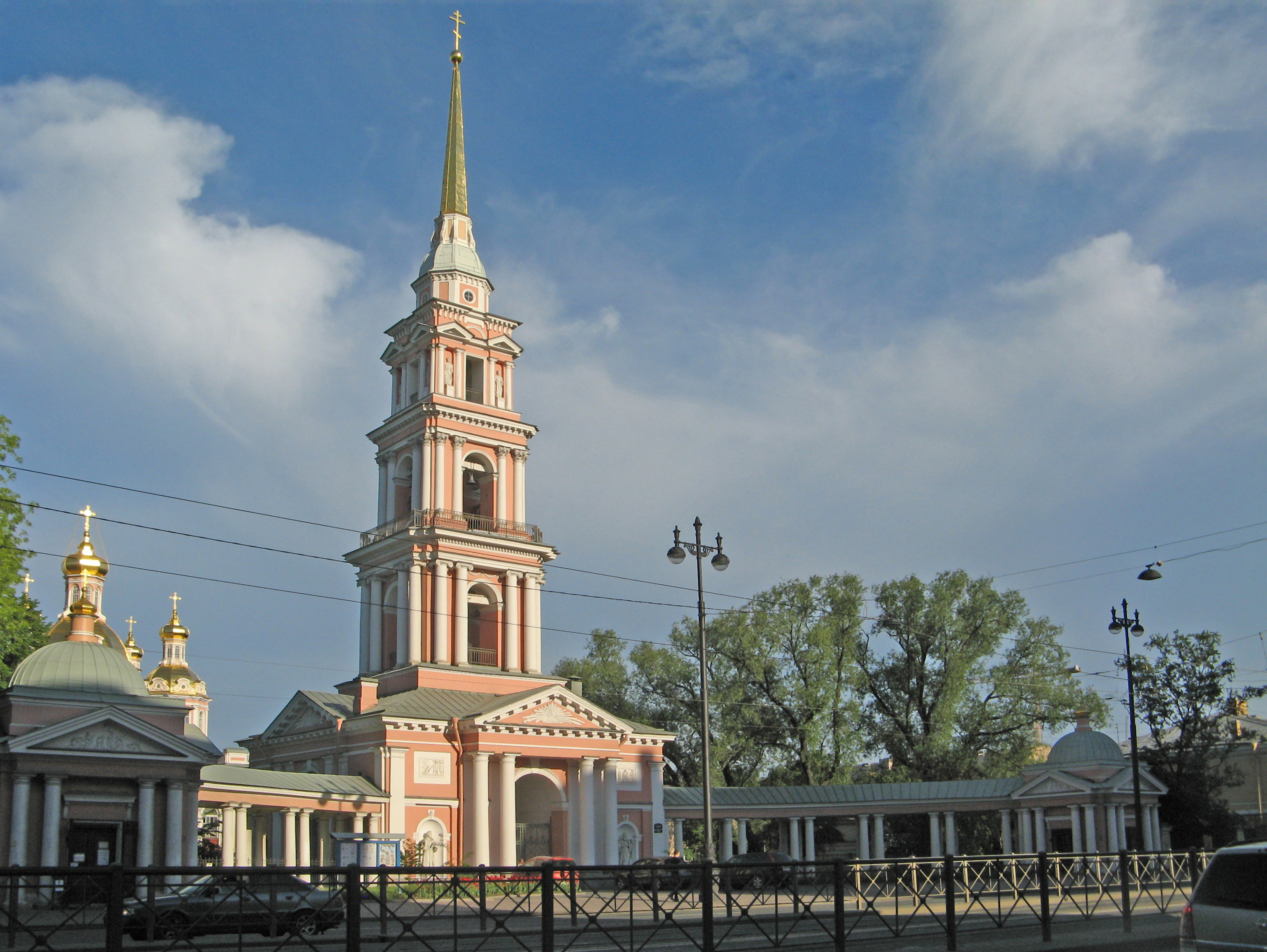 Церковь Воздвижения Креста Господня. Колокольня с двумя часовнями и колоннадами: проспект Лиговский, 128, Центральный район, Санкт-Петербург